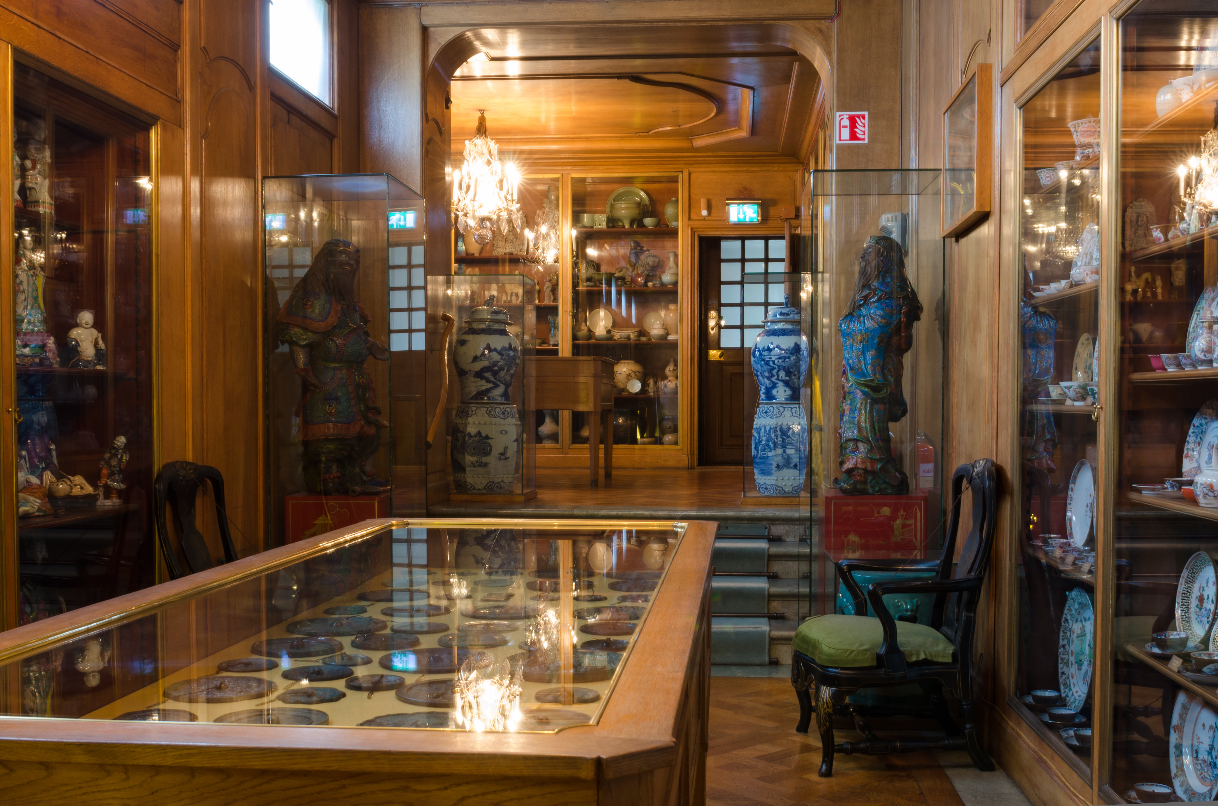 Hallwylska museet.